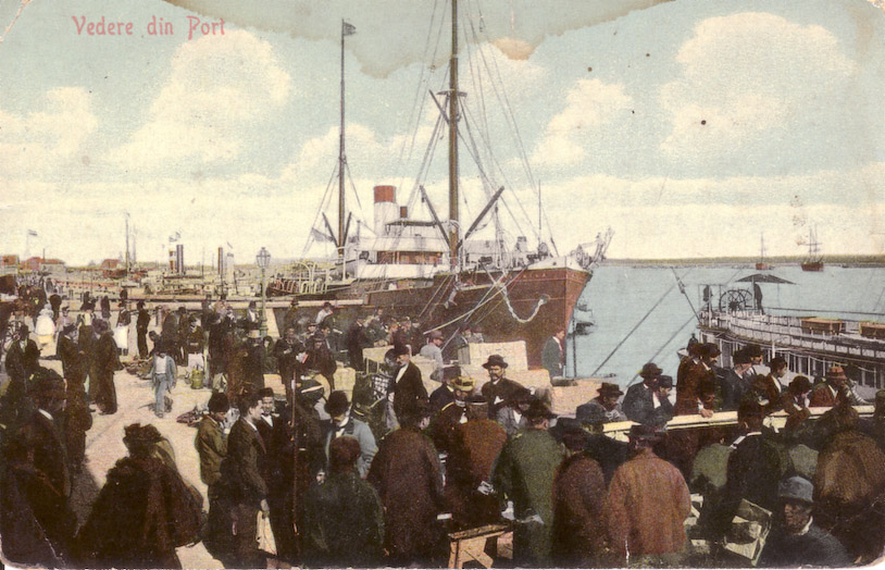 Galaţi: Vedere din port: [Carte poştală ilustrată]. - Bucureşti: Depozitul Universal Şaraga